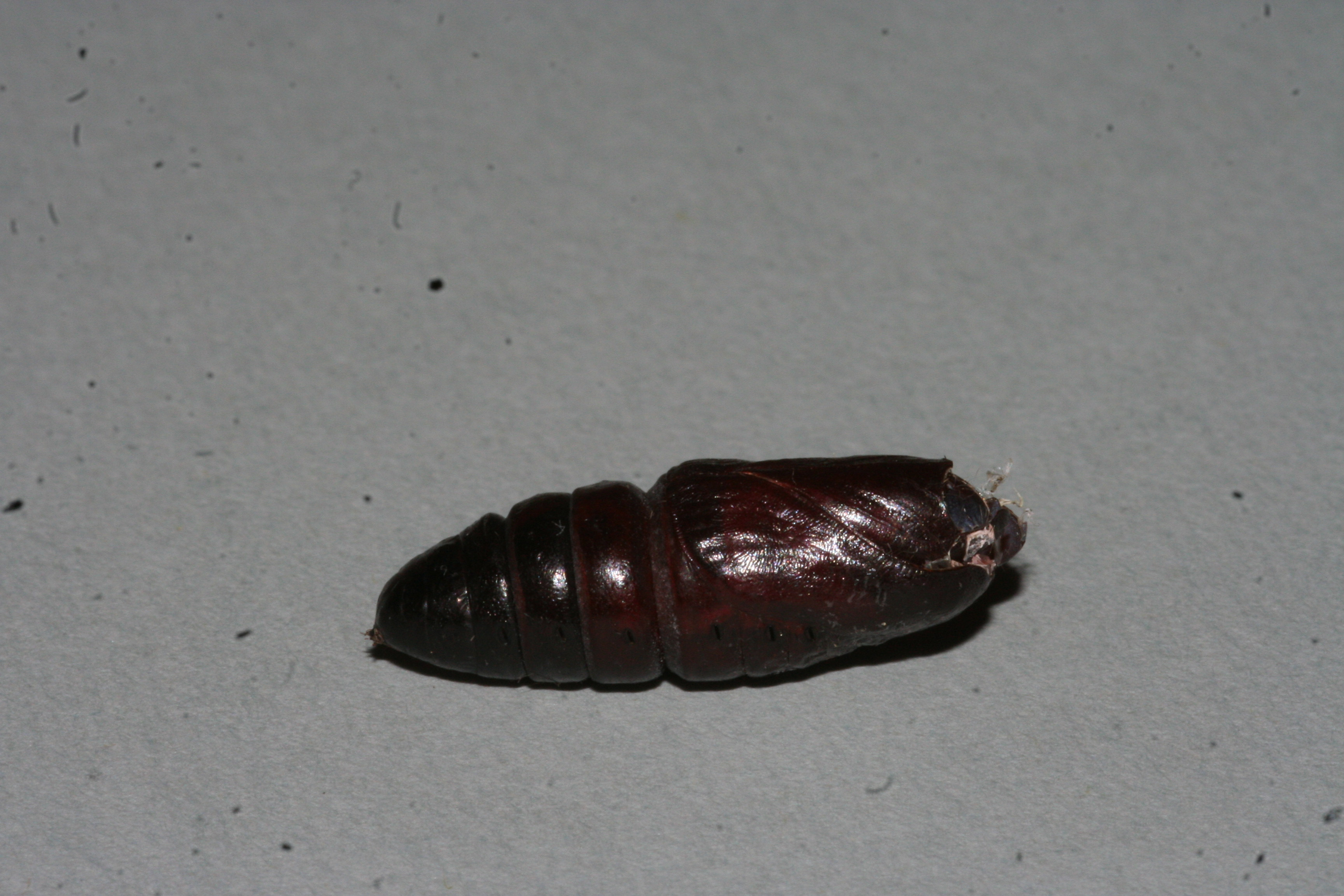 Puppe des Notodonta torva